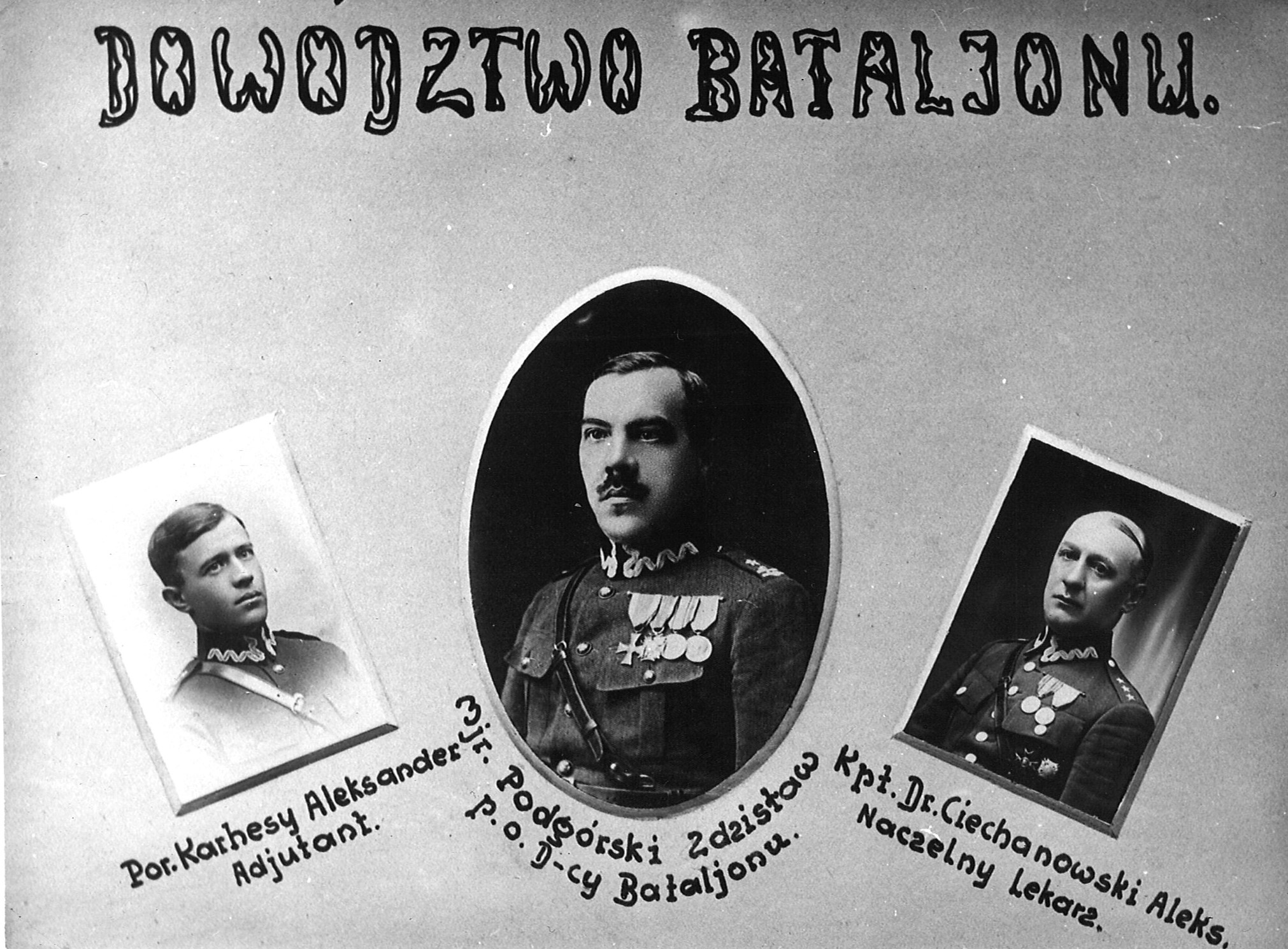 zdjęcie z albumu